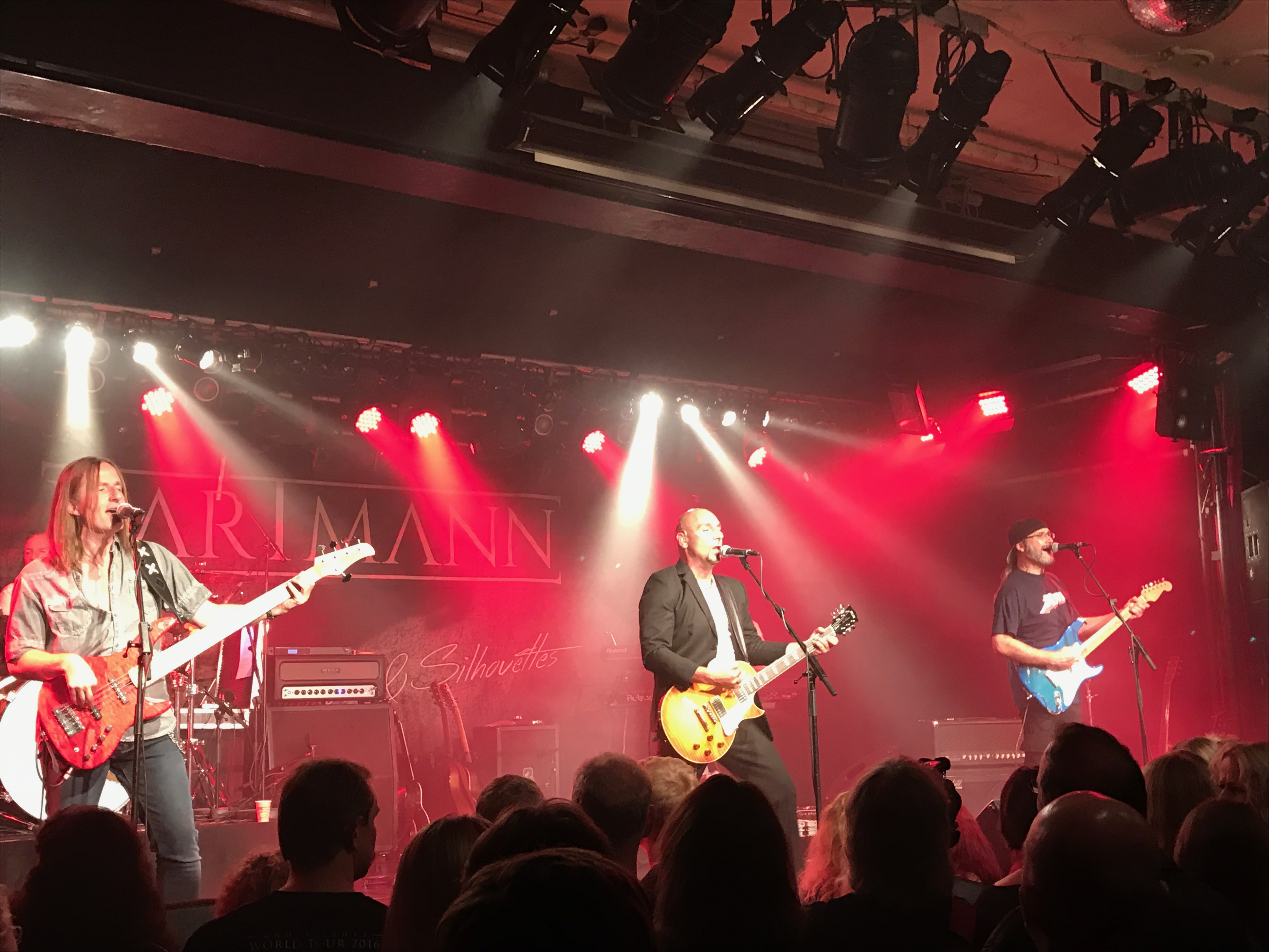 Die deutsche Melodic Rock Band HARTMANN live auf der Release-Party 2016 in Aschaffenburg